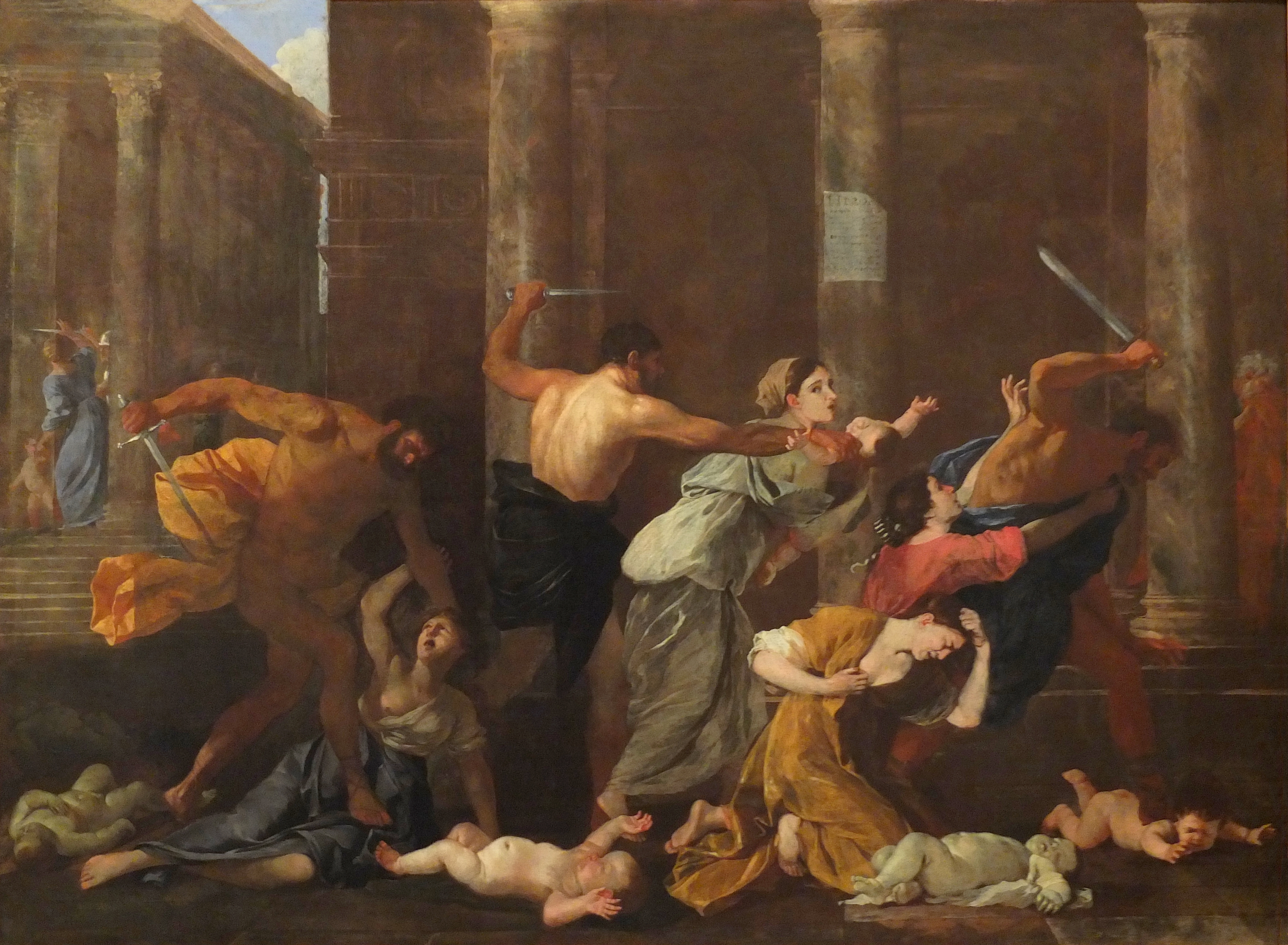 Le Massacre des innocents, huile sur toile de Nicolas Poussin, 97 x 132 cm, musée des Beaux-Arts de la Ville de Paris. Legs Dutuit 1902, n° INV : PDUT00879 - Larges repeints anciens au centre après accident. Attribué récemment à Poussin.